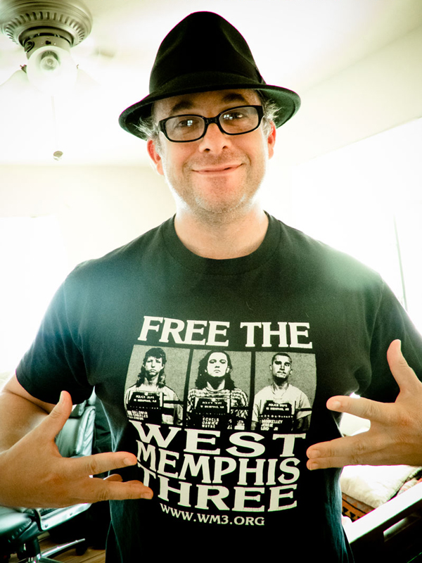 La camiseta diseñada por la organización sin fines de lucro WM3 Freedom Fund, dedicada a reunir dinero para costear las necesidades básicas de Damien Echols, Jason Baldwin y Jessie Misskelley, Jr., quienes fueron encarcelados en 1996 por el asesinato de tres niños en la ciudad de West Memphis y que en el 2011 fueron liberados tras presentar un recurso judicial basado en la Segunda Enmienda de la Constitución estadounidense. El caso se conoce como West Memphis Three o Los Tres de West Memphis.